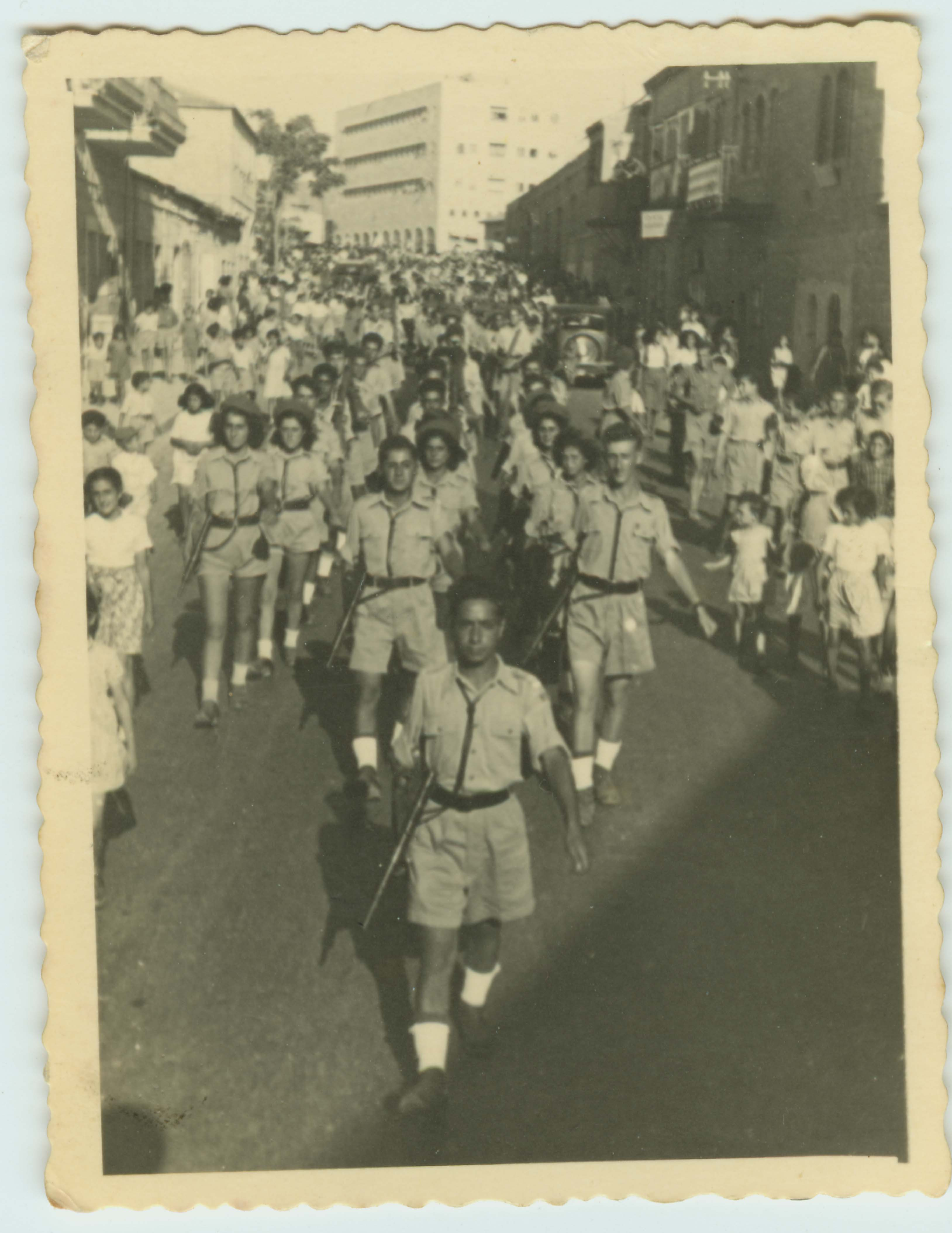 מצעד גדנ"עים ילידי 1931, ברחוב אגריפס בירושלים, בהפוגה הראשונה, יוני 1948.